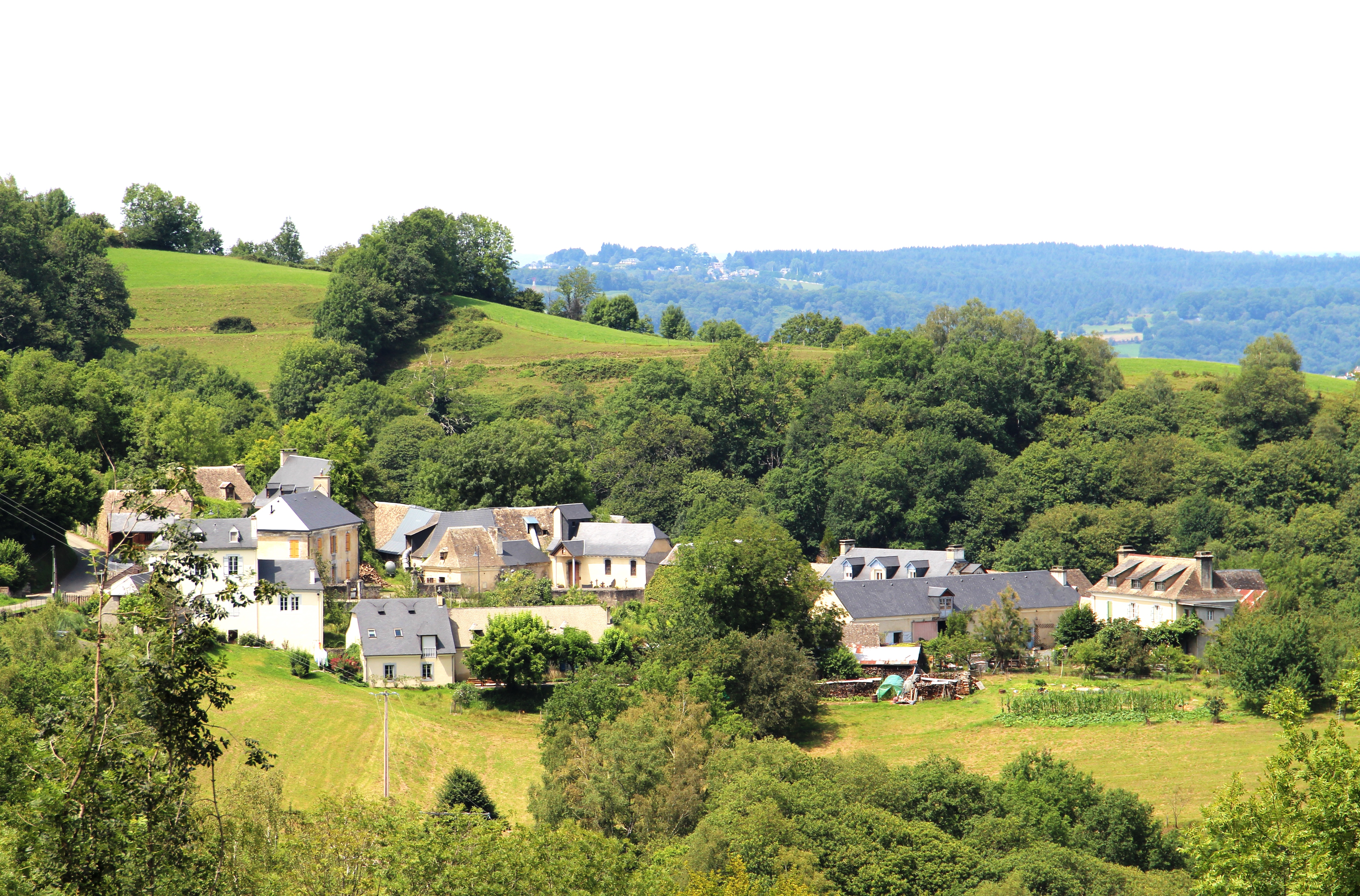 Artigues (Hautes-Pyrénées)